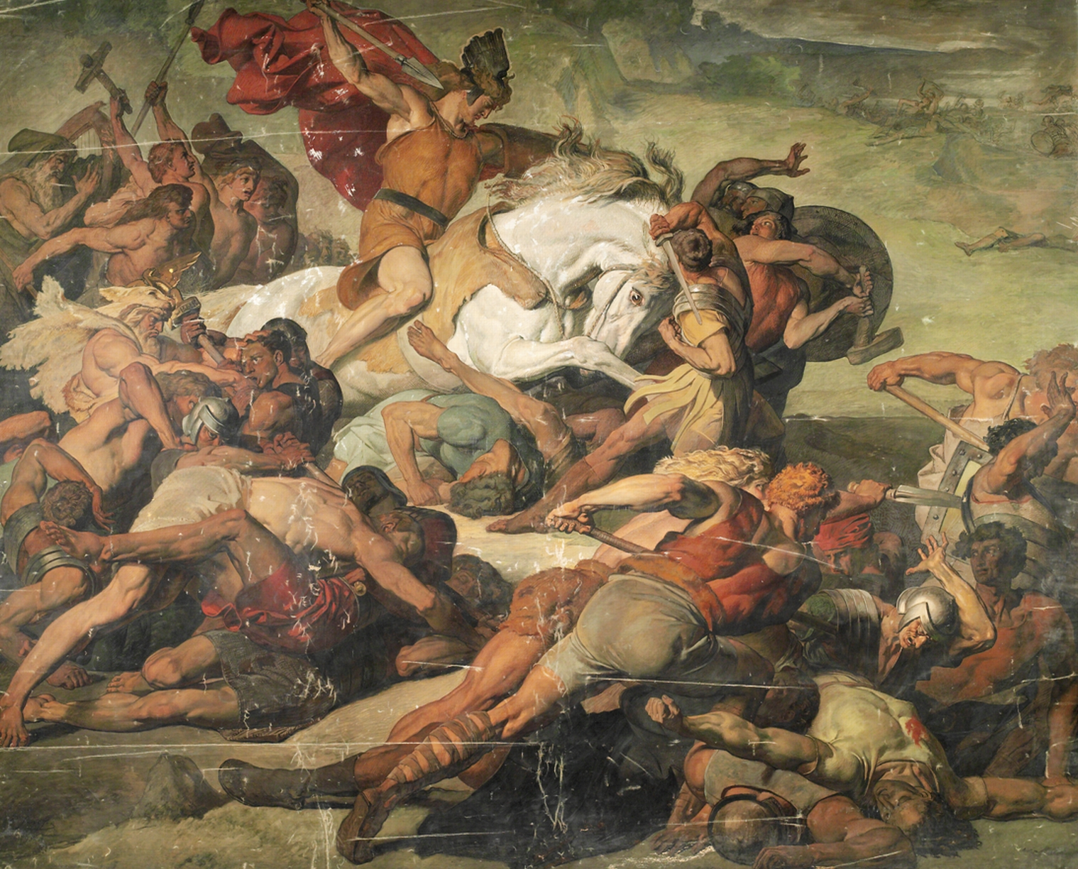 Der siegreich vordringende Hermann, Kunstmuseen Krefeld